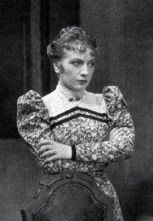 Nella Maria Bonora